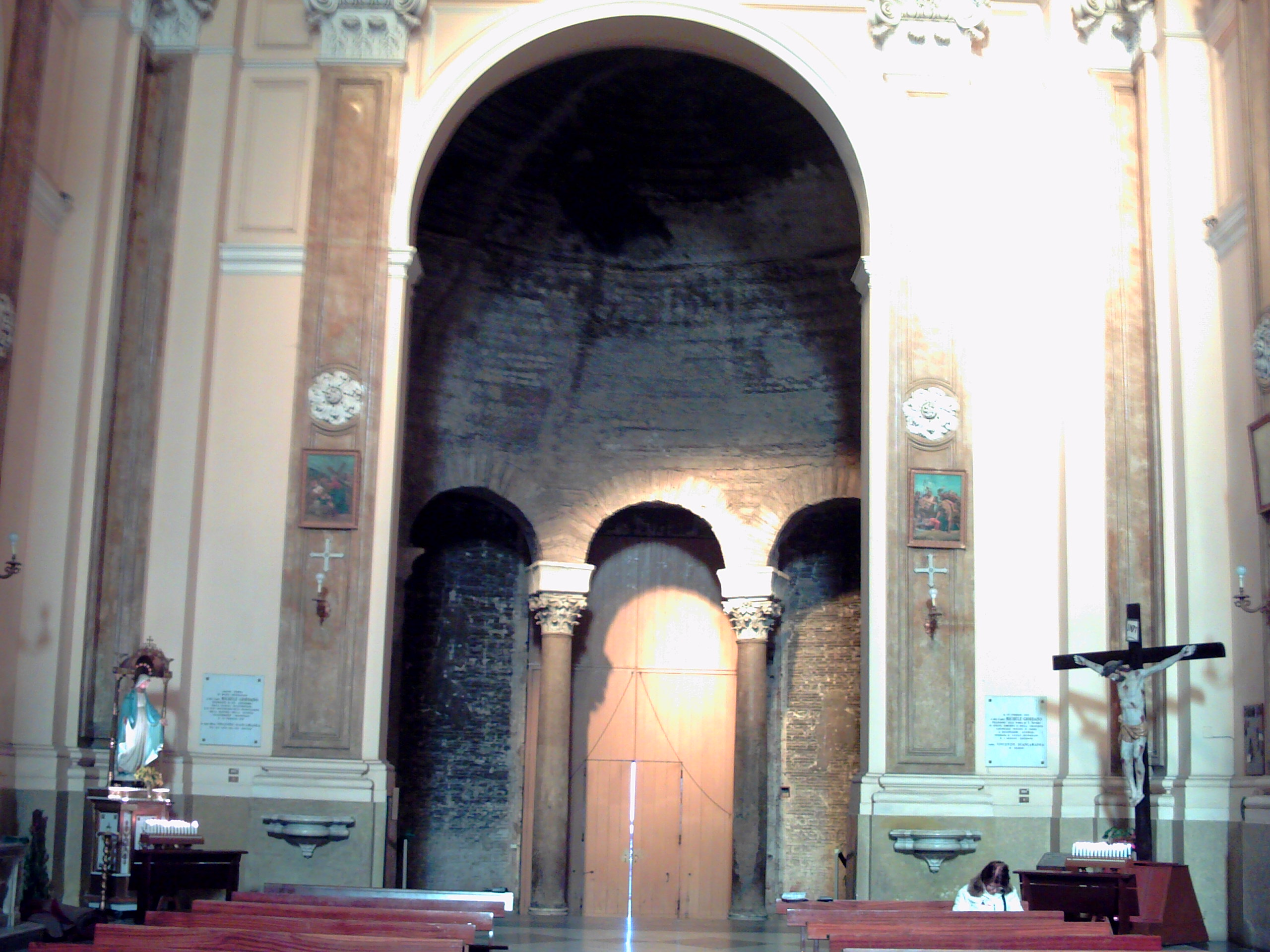 Abside antica (Chiesa San Giorgio Maggiore)